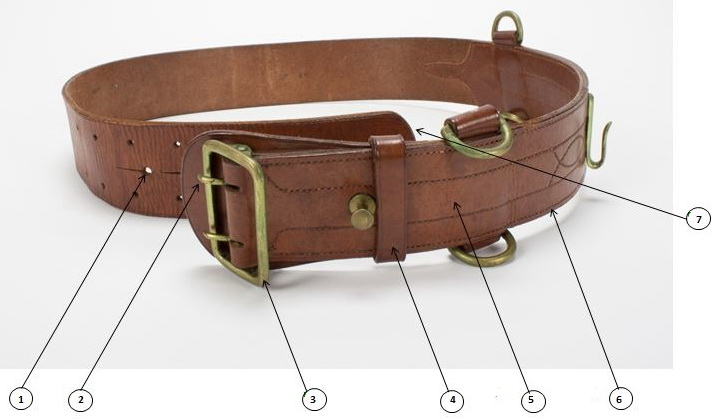 Belt components scheme 1. Отверстие. 2. Язычок пряжки. 3. Пряжка. 4. Шлёвка. 5. Гладкая сторона. 6. Прошивка. 7. Кончик